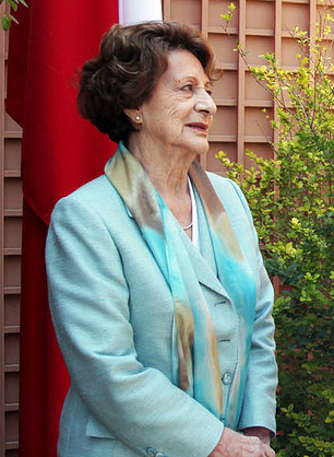 Ángela Jeria, madre de Michelle Bachelet